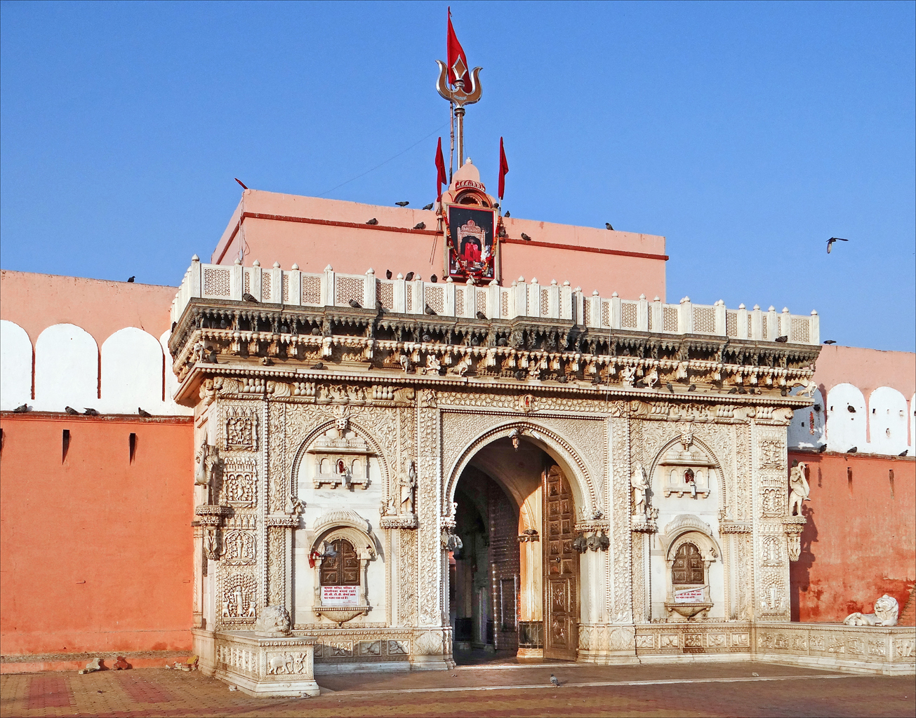 Façade du temple de Karni Mata La mystique Karni Mata est considérée par les dévots comme une incarnation de Durga. Elle vécut au XVème siècle. Le temple qui lui est consacré est situé à Deshnoke (village à 33 km de Bikaner). Il est peuplé de rats sacrés qui sont en liberté et circulent entre les jambes des visiteurs. Les bâtiments du temple datent du XVIIème siècle (époque de Ganga Singh). La façade est en marbre blanc finement sculpté avec des portes et volets en argent massif.